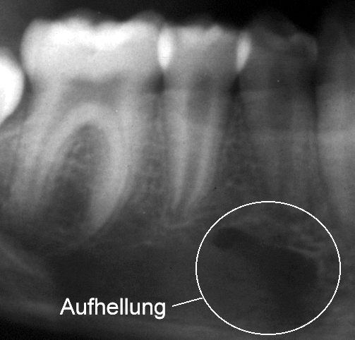 Aufhellung auf einem Röntgenfilm. Ausschnitt aus einem anonymisierten Röntgenbild. Autor ist Besitzer des Röntgenbildes (auch nach der Röntgenverordnung).